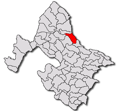 Categorie:Hărţi ale judeţului Mehedinţi